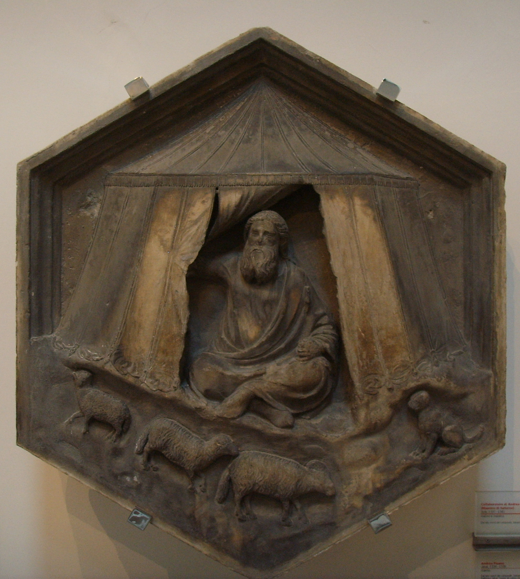 Formella 04, jabal, andrea pisano, 1334-1336